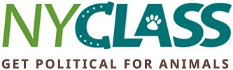 NYCLASS' logo and motto.